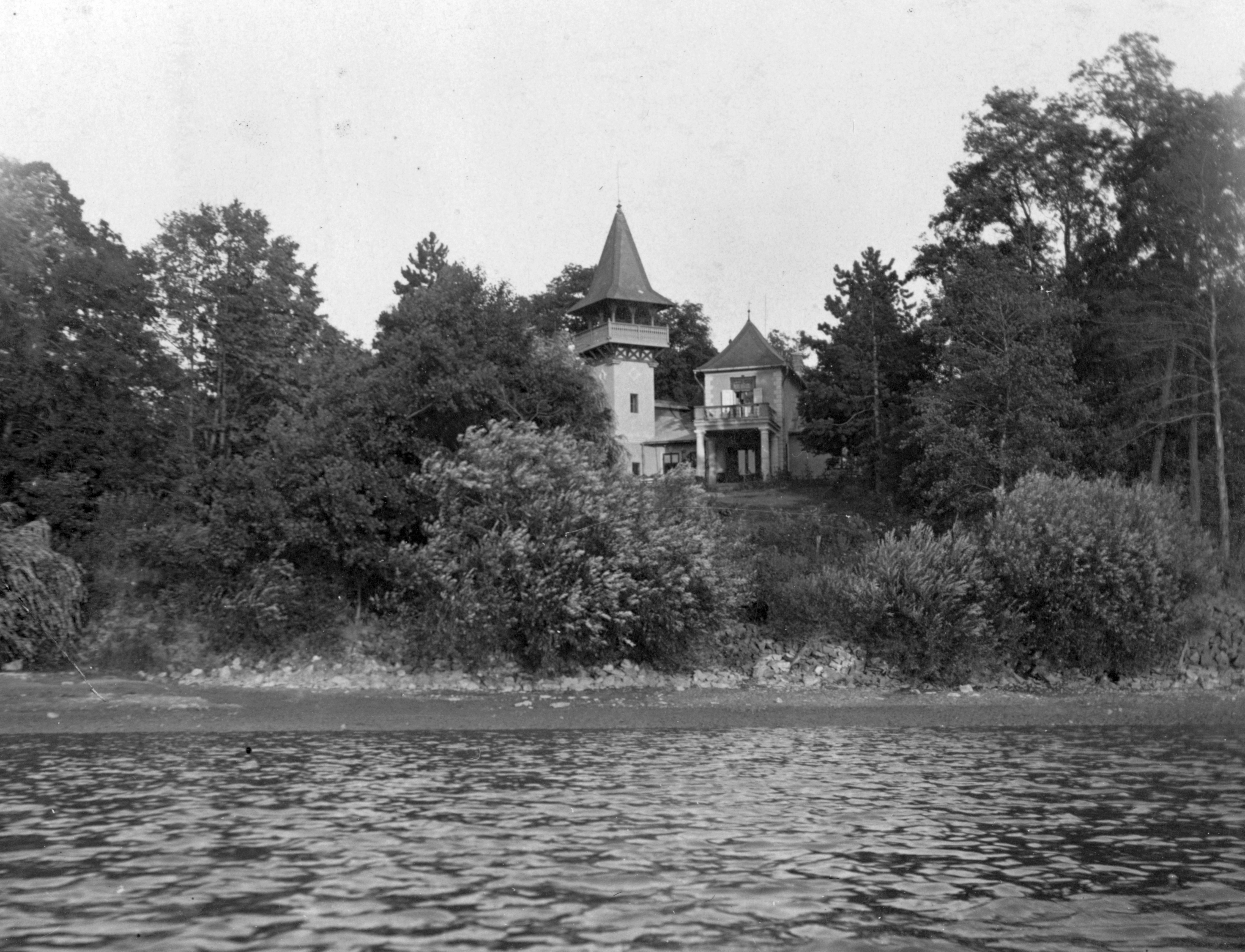 Huzella villa. Location: Hungary, Alsógöd Tags: shore Title: Huzella villa.